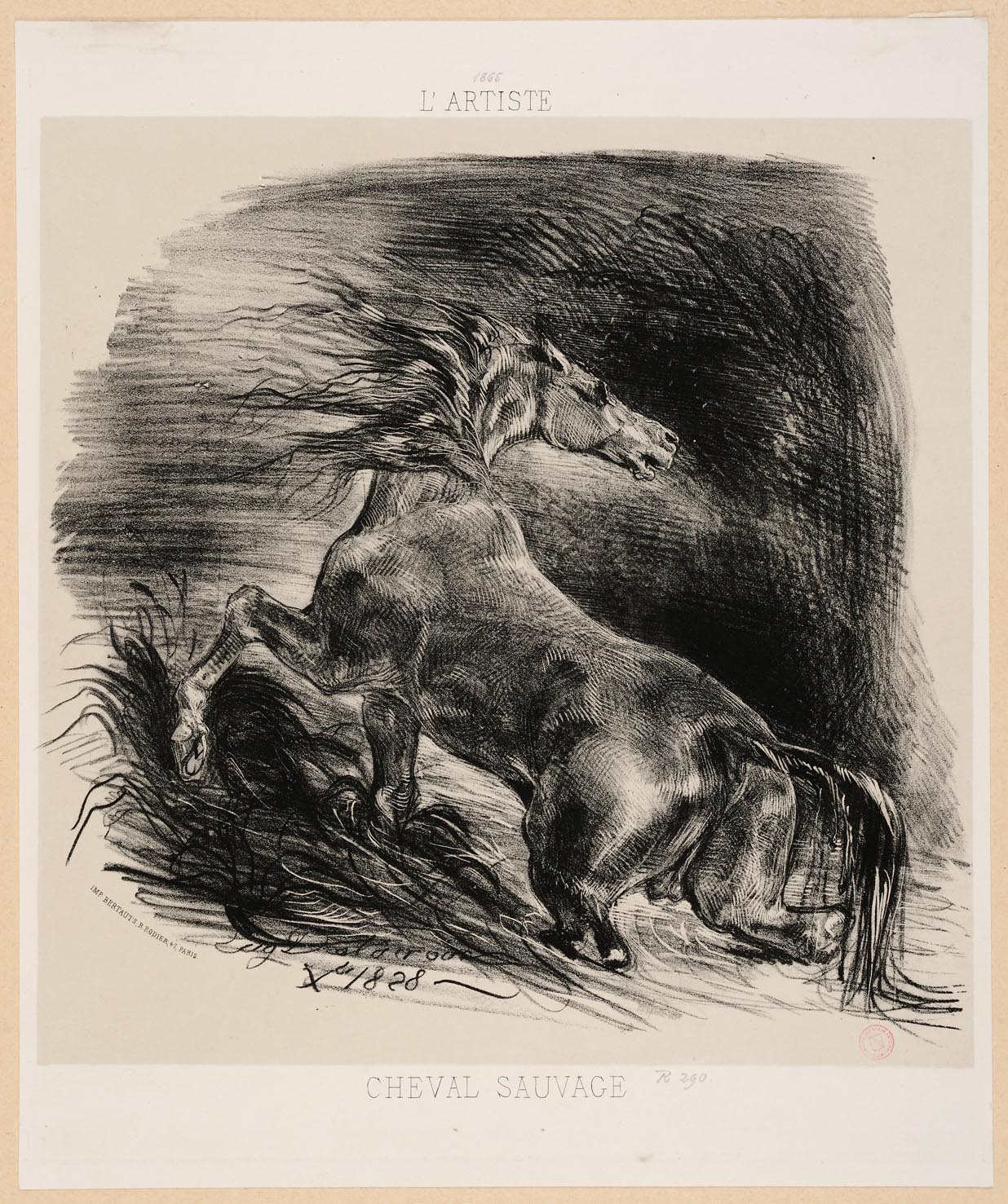 Lithographie d'après Eugène Delacroix, imprimée par Bertauts, et publiée dans le journal l'Artiste en 1865